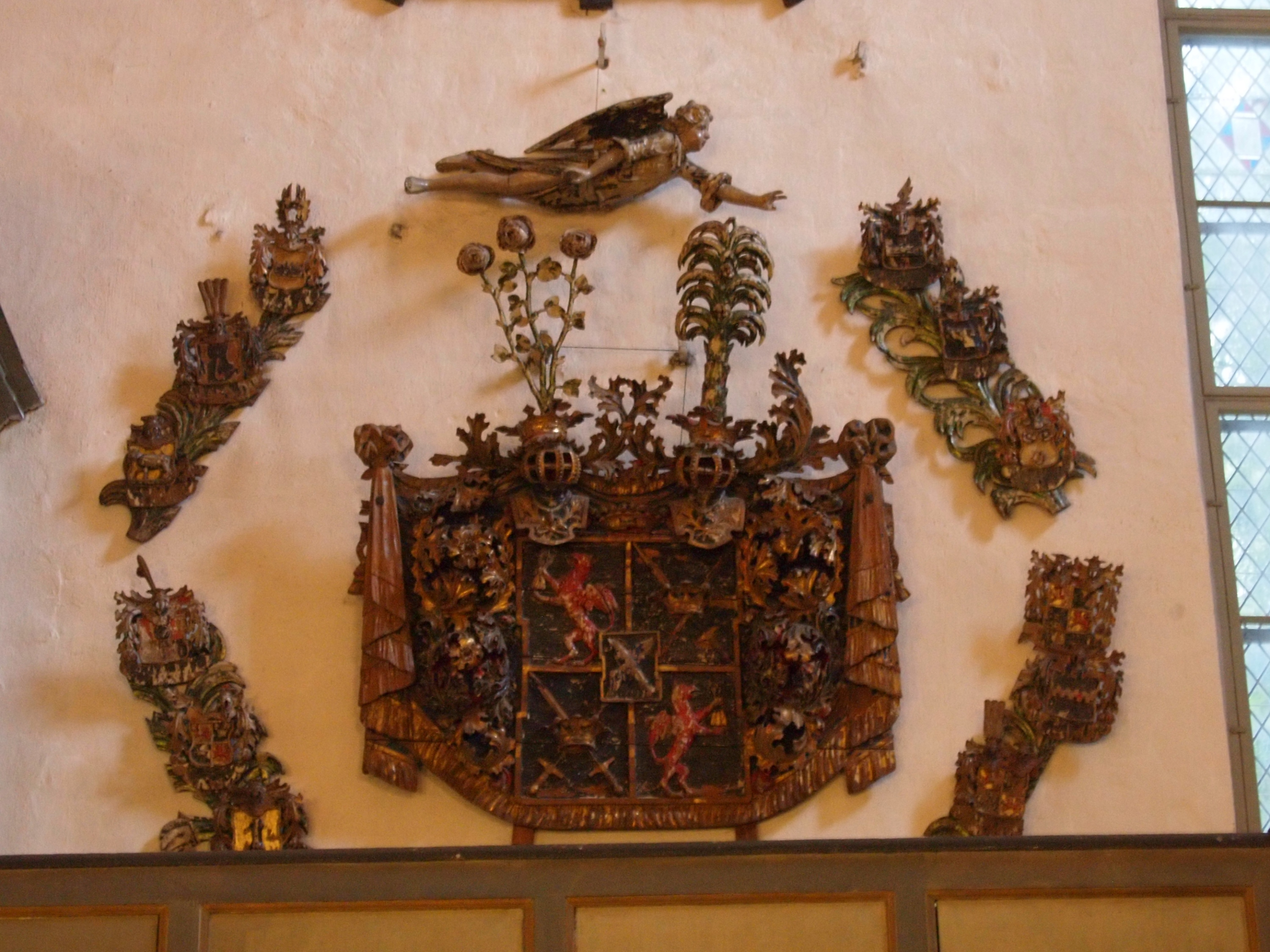 Otto Wilhelm von Ferseni vappepitaaf Tallinna Toomkirikus